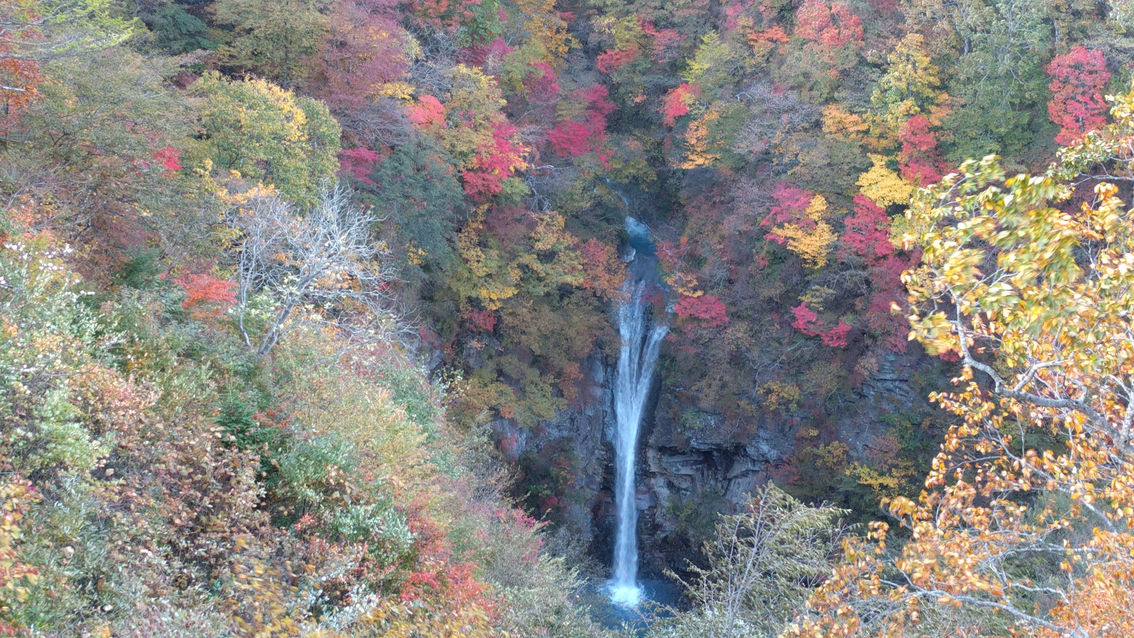 駒止の滝。栃木県那須郡那須町湯本。